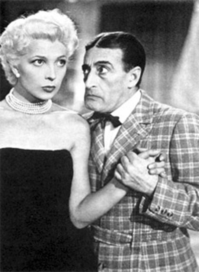 Totò and Isa Barzizza in the Italian film Le sei mogli di Barbablù (1950)